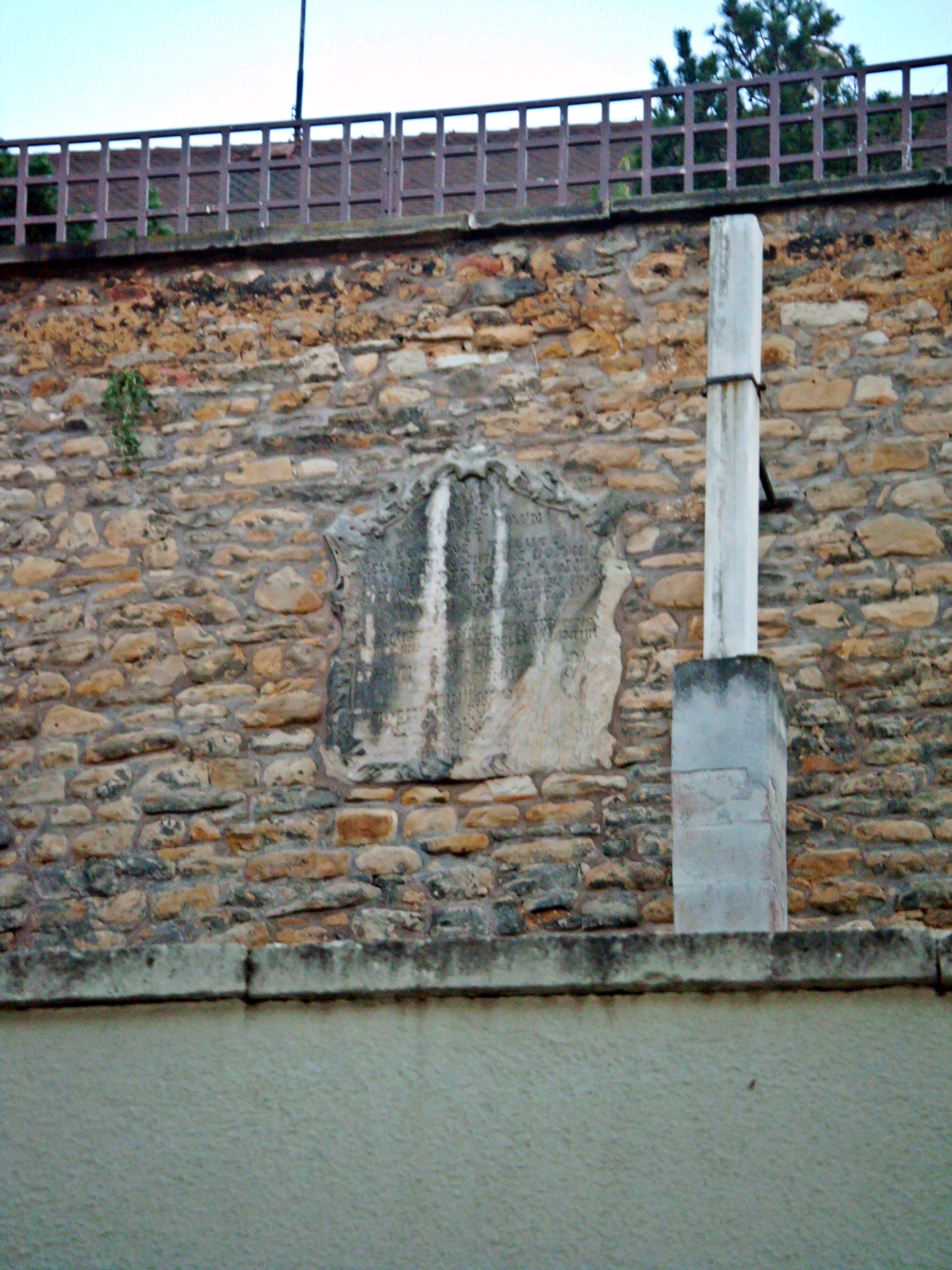 Barocke Bauinschrift an der Schlossmauer des ehem. Schlosses